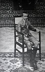 El príncipe don Carlos de Borbón y Orléans